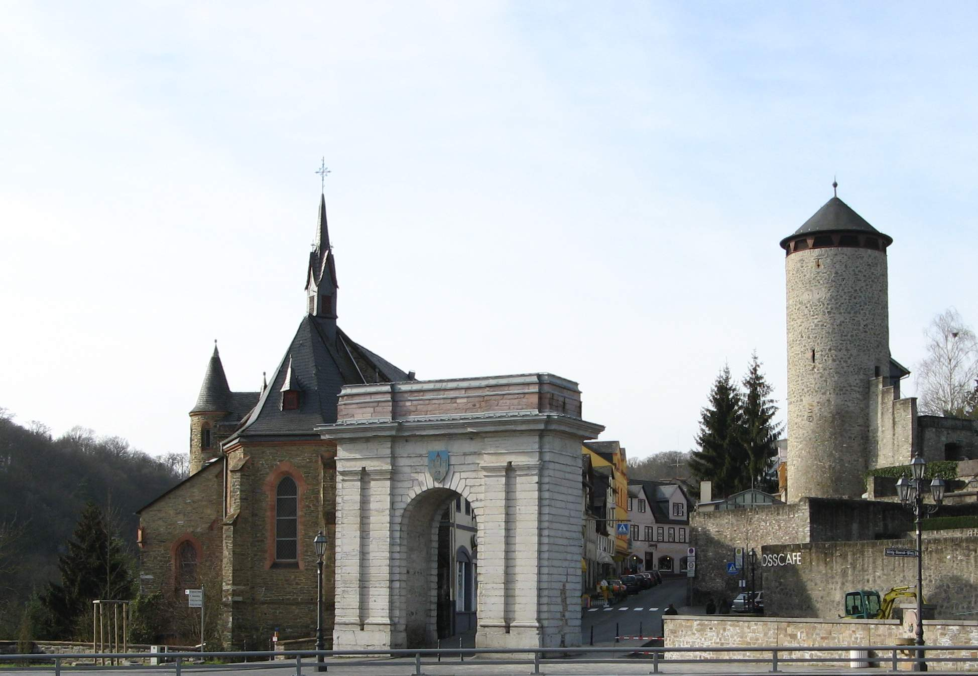 Landtor in Weilburg This is a picture of the hessian Kulturdenkmal (cultural monument) with the ID 52312